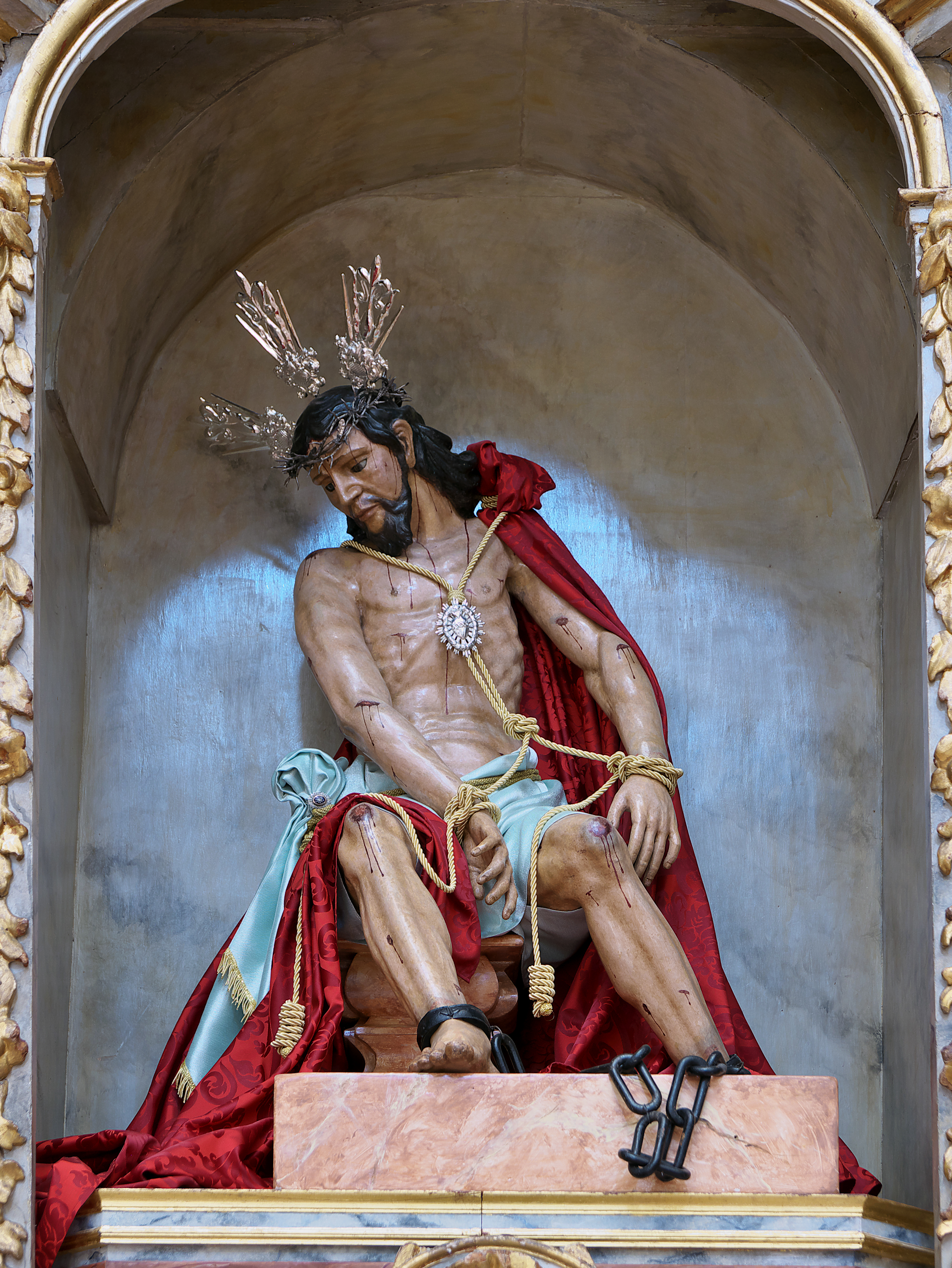 Iglesia de la Merced, Huelva. Imagen de autor anónimo (s. XVIII), titular de la Real e Ilustre Hermandad Sacramental y Capitular de Nuestro Padre Jesús de las Cadenas, Santísimo Cristo de Jerusalen y Buen Viaje y María Santísima de los Dolores.